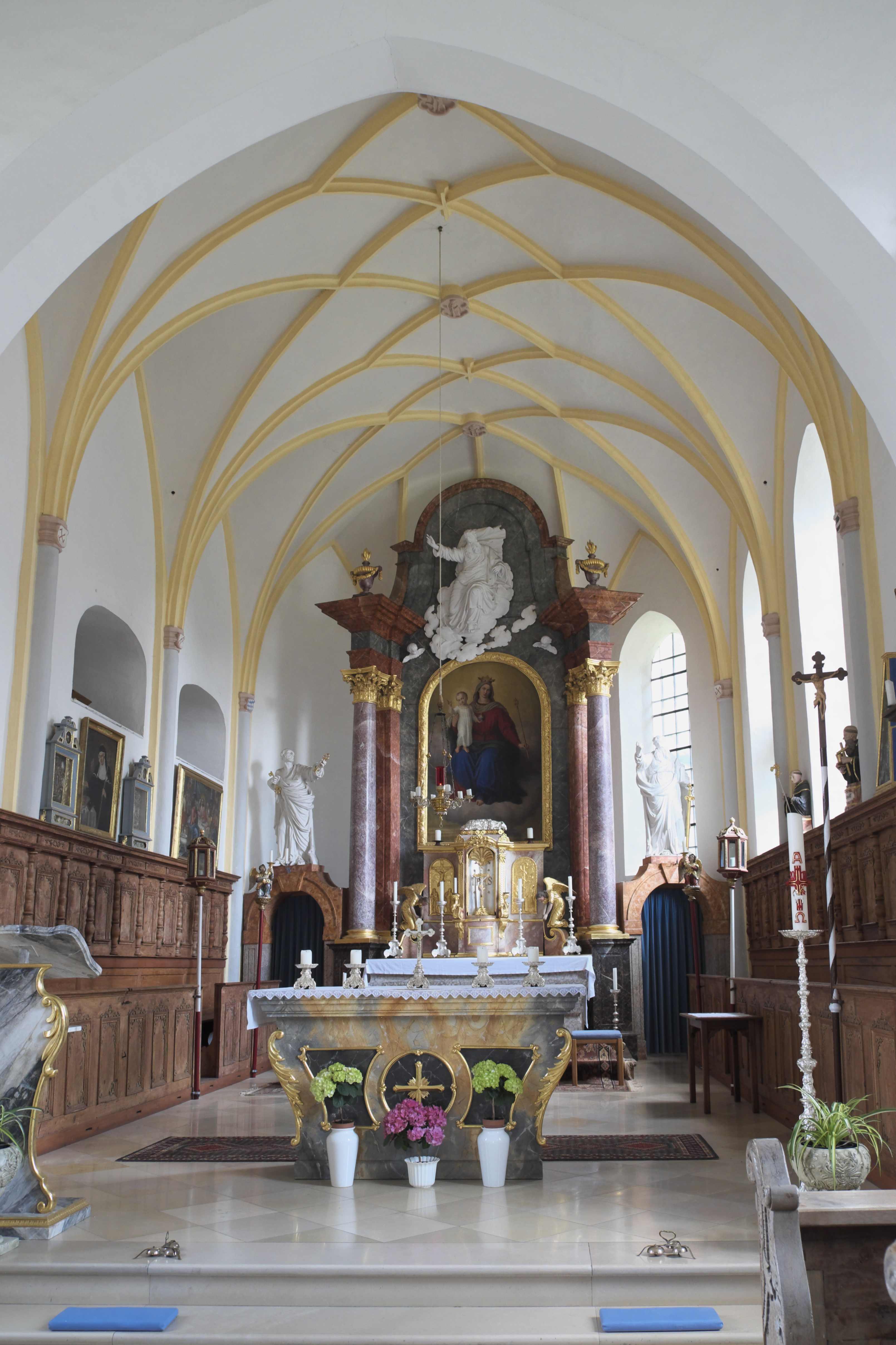 Katholische Filialkirche St. Peter und Paul in Holzkirchen (Alling) im Landkreis Fürstenfeldbruck (Bayern/Deutschland), Chor